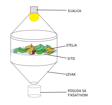 Prikaz osnovnih delova aparature